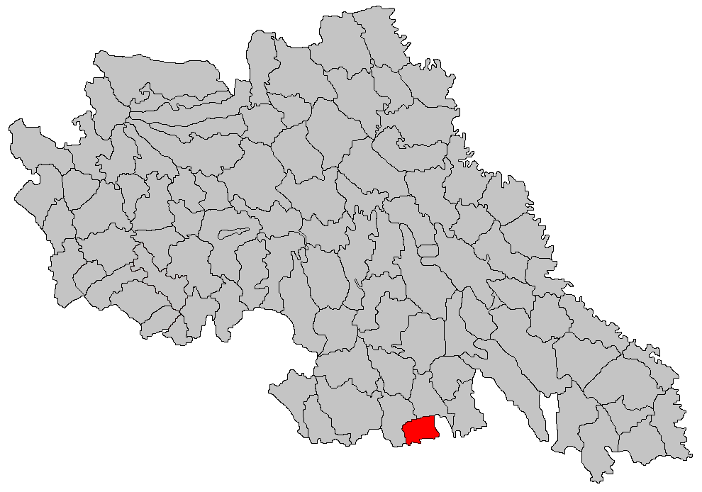 Categorie:Hărţi ale judeţului Iaşi